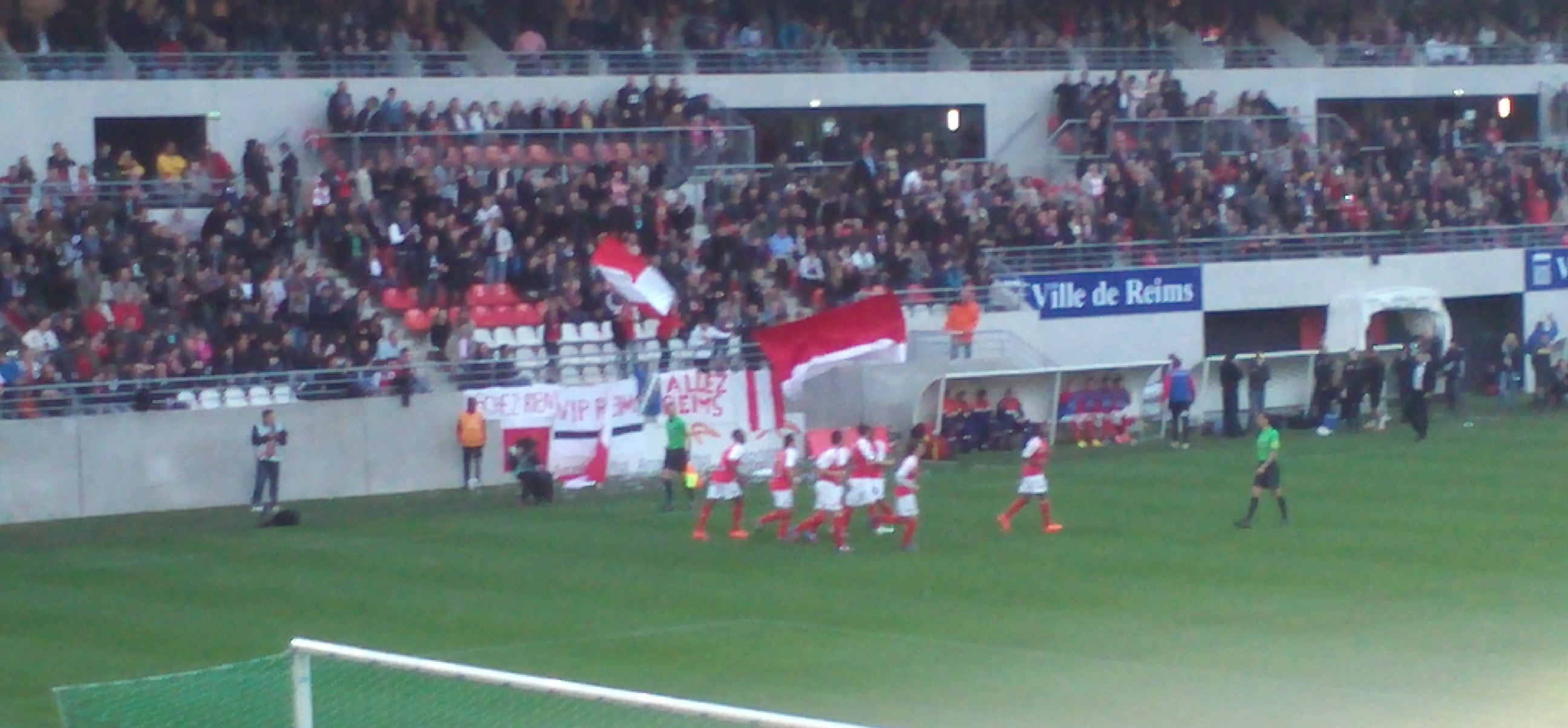 Scène de joie après le but de Fortes lors de Reims-Boulogne.